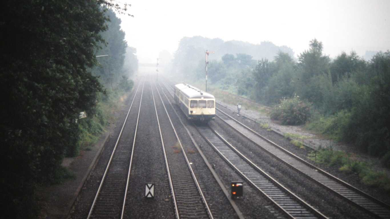 DB-Akkutriebwagen Baureihe 515 + Beiwagen im Sommer 1989 am Abzweig Wuppertal-Lüntenbeck auf der Wuppertaler Nordbahn, Fahrtrichtung W-Vohwinkel. Links die Gleise von Dornap-Hahnenfurt. Film-Nr 106